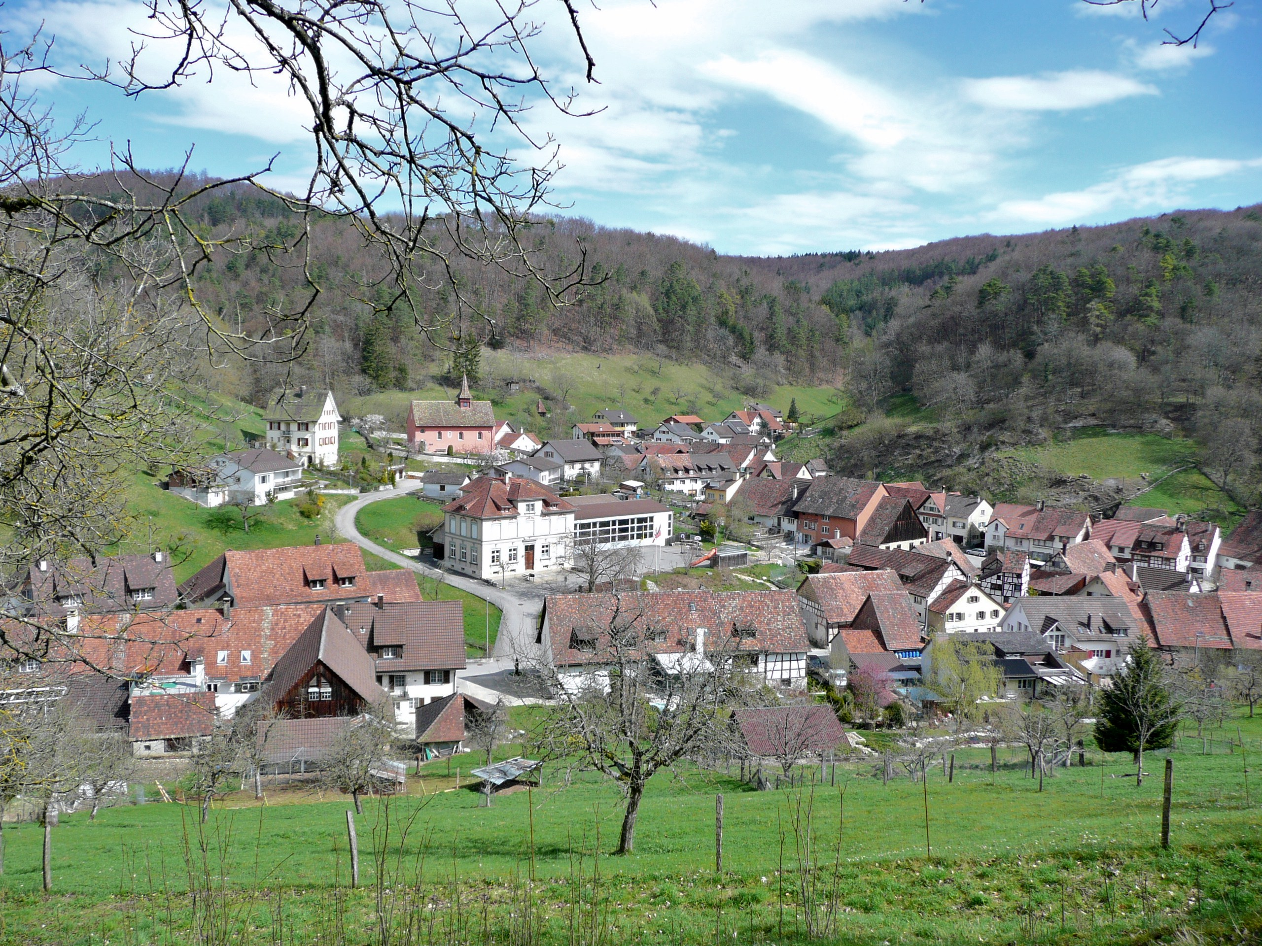 Blick auf Hemmental, Kanton Schaffhausen, Schweiz